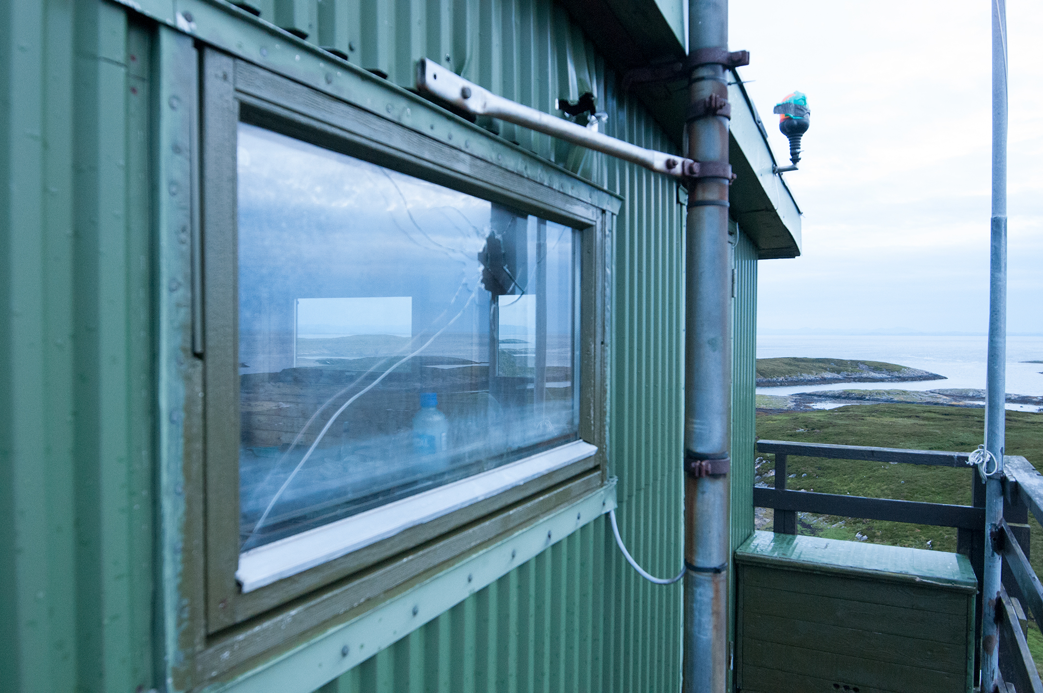 Observatørtårn i skytefeltet på Karsløya i øygruppen Tarva. Tårnet har skader etter et uhell hvor tårnet ble beskutt av F16 sommeren 2009[1]